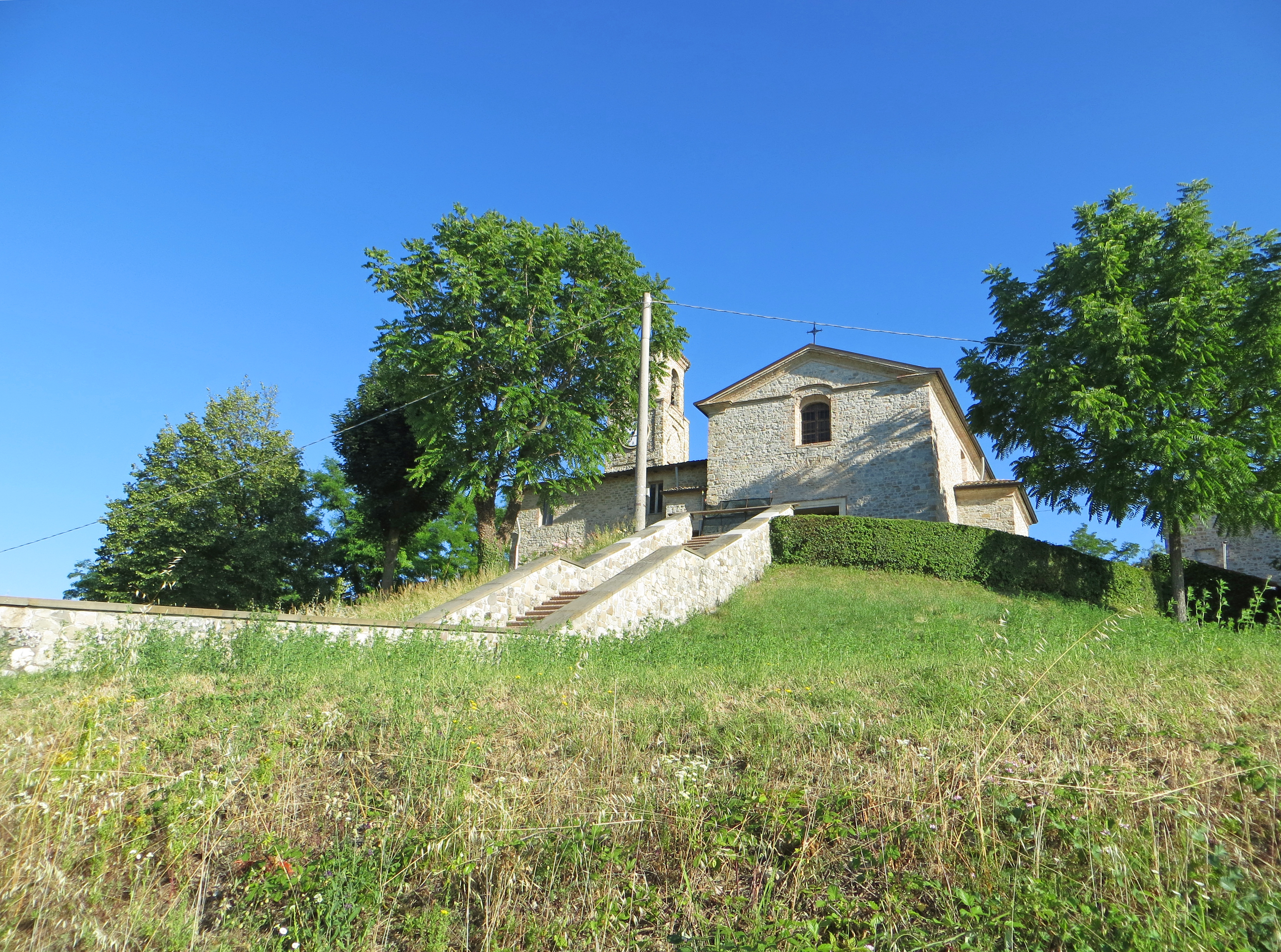 Pieve di Sant'Antonino Martire (Barbiano, Felino) - scalinata di accesso